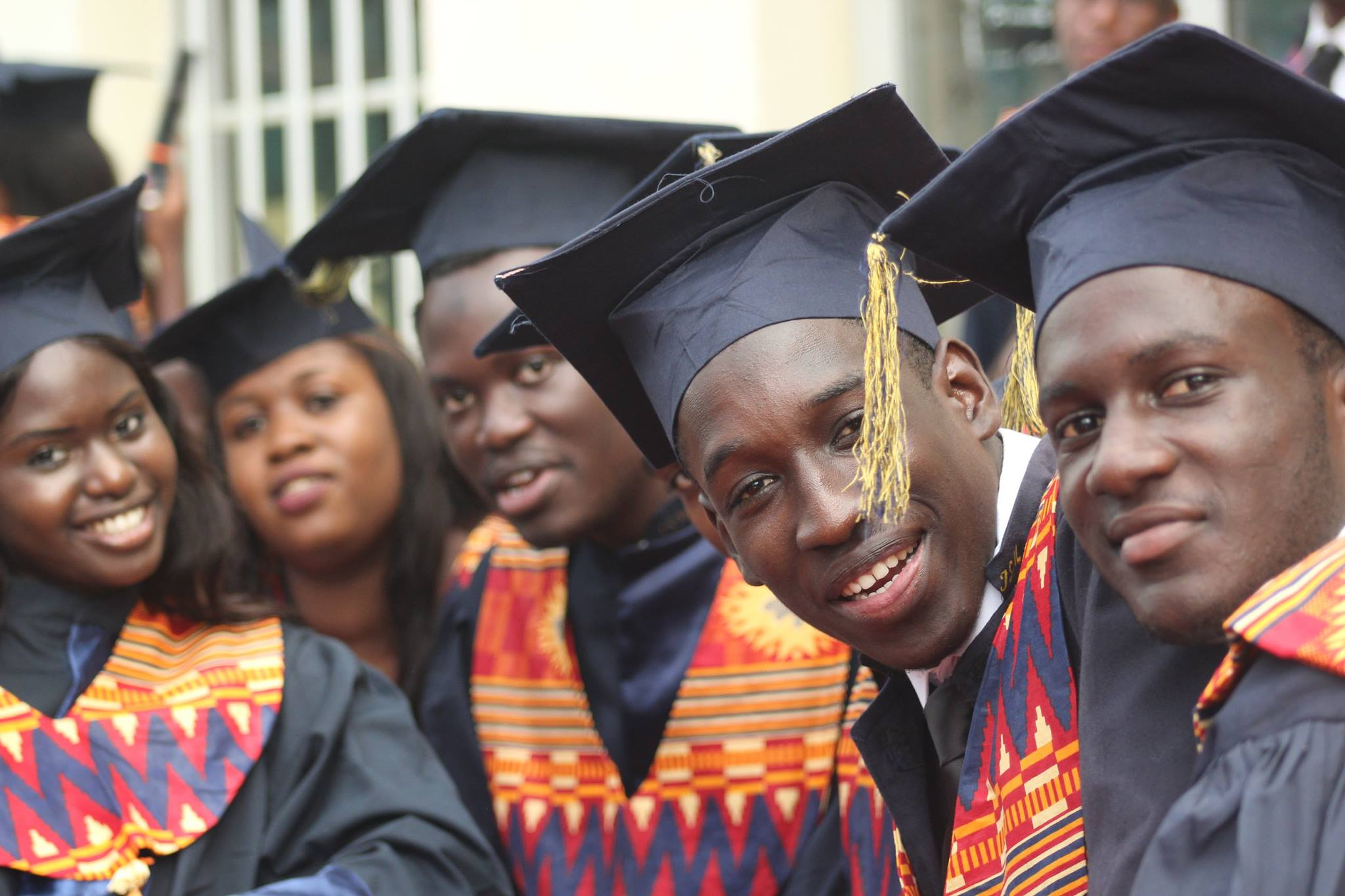 Cérémonie de remise de diplômes du Groupe ISM. Promotion Amadou Diaw